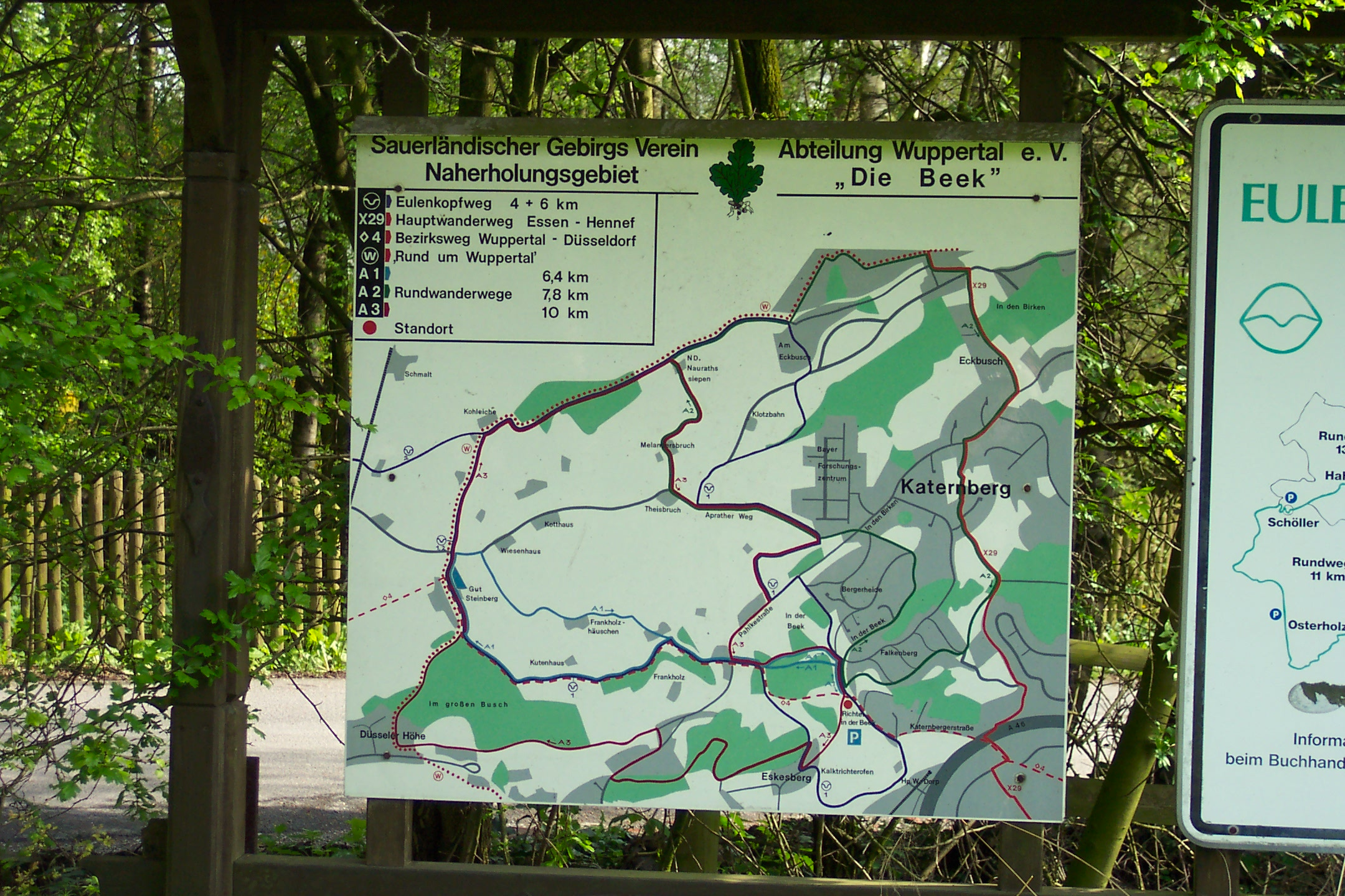 Der Eulenkopfweg, Wuppertal